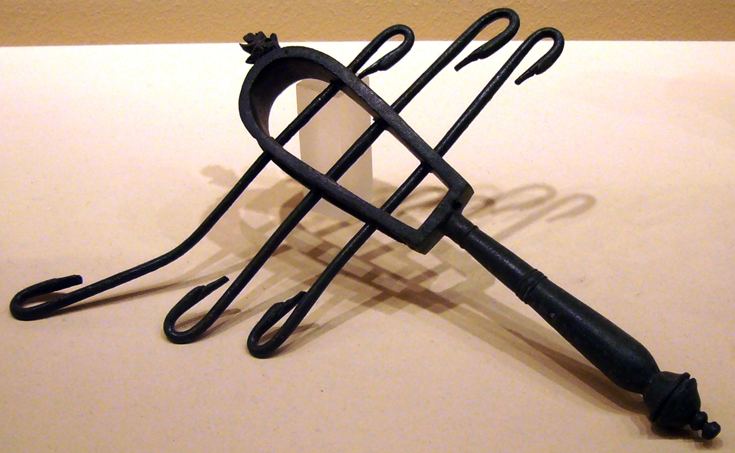 Sistro romano. Taken at exhibition "Memorie dal sottosuolo. 25 anni di scavi a Roma" (Roma, 02 dicembre 2006 - 09 aprile 2007).